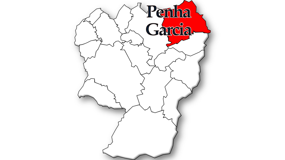 População